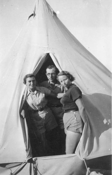 אוהל משפחתי-בגלל המצוקה בדיור נאלצו משפחות לארח באוהל שלהם בחור או בחורה נוספים שנקראו-פרימוס